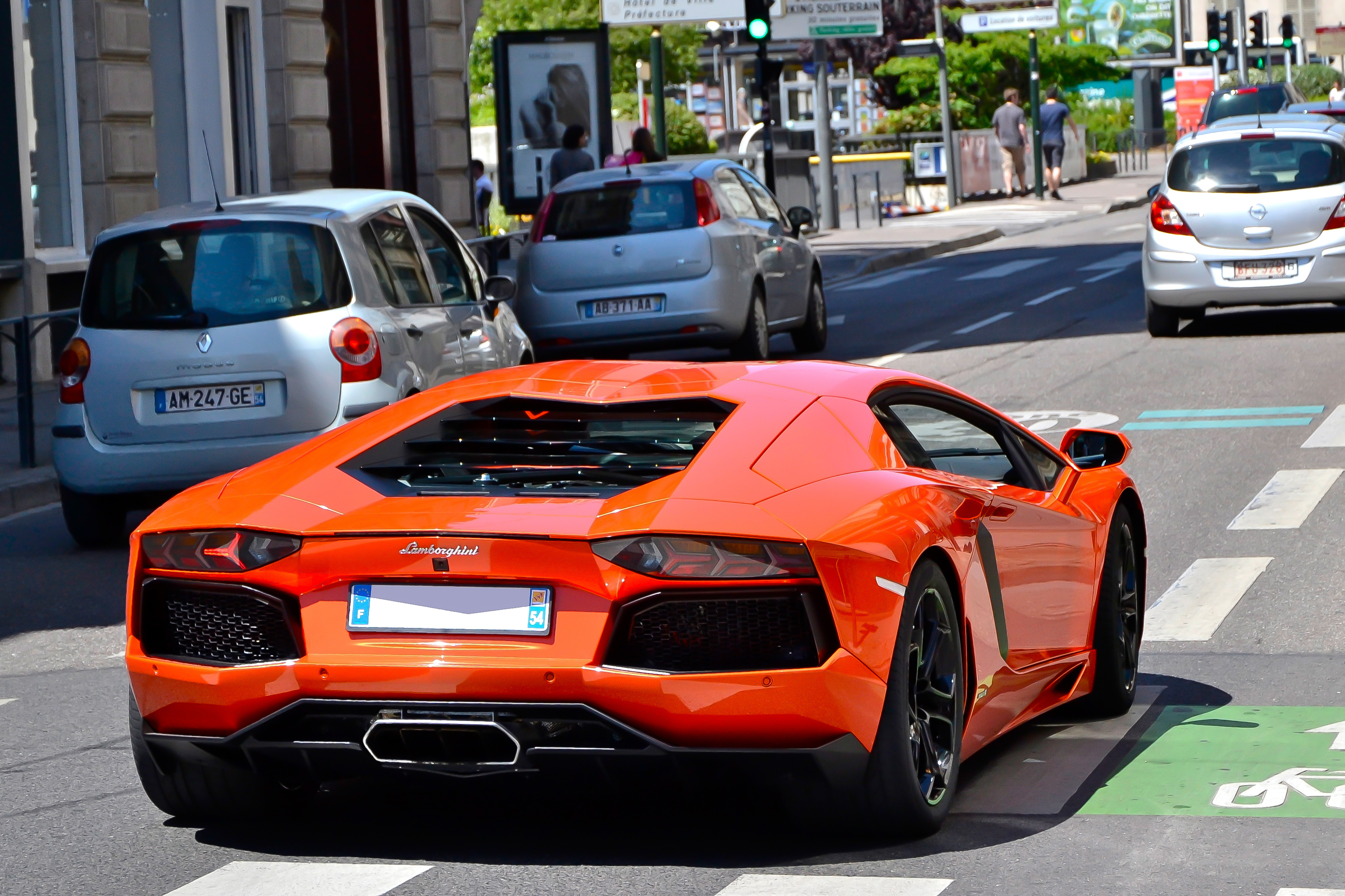 Lamborghini Aventador LP 700-4